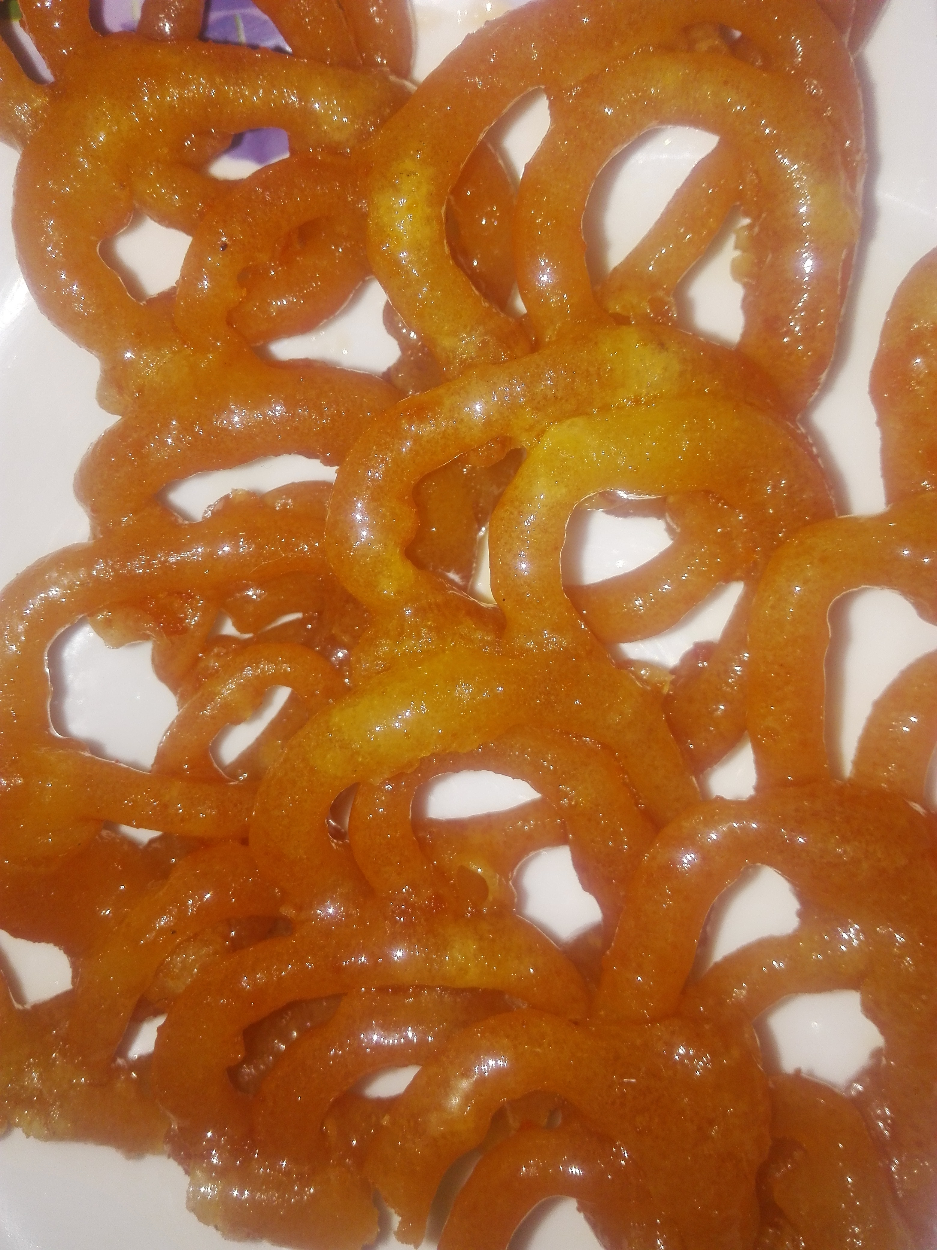 jilapi